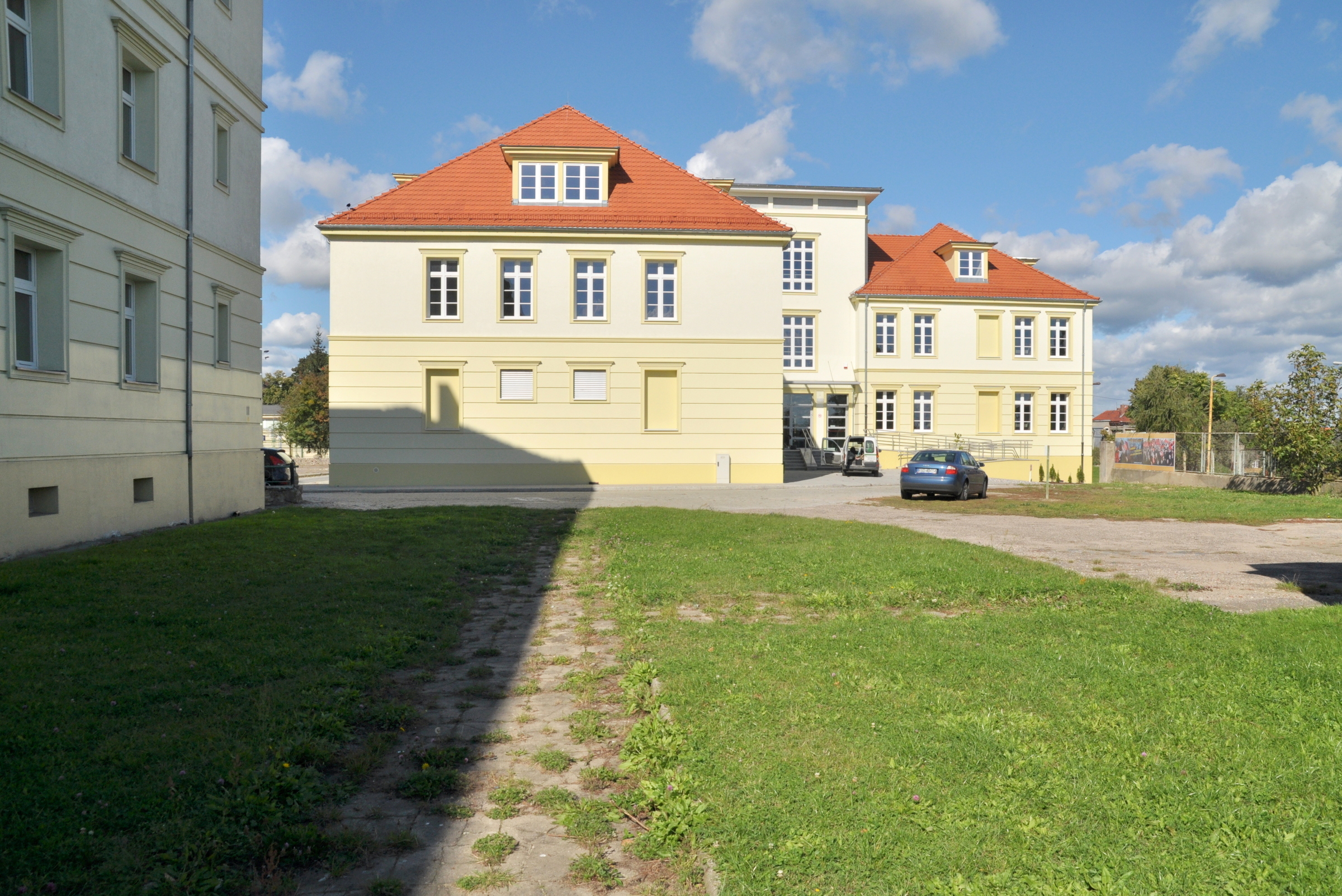 Gorzów Wlkp., ul. Chopina. Układ urbanistyczno-architektoniczny "Górnego Miasta" wpisany do Gminnej Ewidencji Zabytków. Dawne koszary im. gen. Hermanna von Stranza w Landsbergu (I batalion Infanterie Regiment nr 50), po wojnie - obóz jeniecki NKWD, a po przekazaniu koszar w 1947 r. Wojsku Polskiemu, miejsce stacjonowania 4 Brygady Saperów. Po upadku systemu - Sąd Rejonowy, Prokuratura Rejonowa i Akademia im. Jakuba z Paradyża. Na foto - budynek auli Akademii